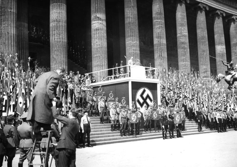 Berlin Kundgebung zum 1. Mai 1936 am alten Museum im Lustgarten